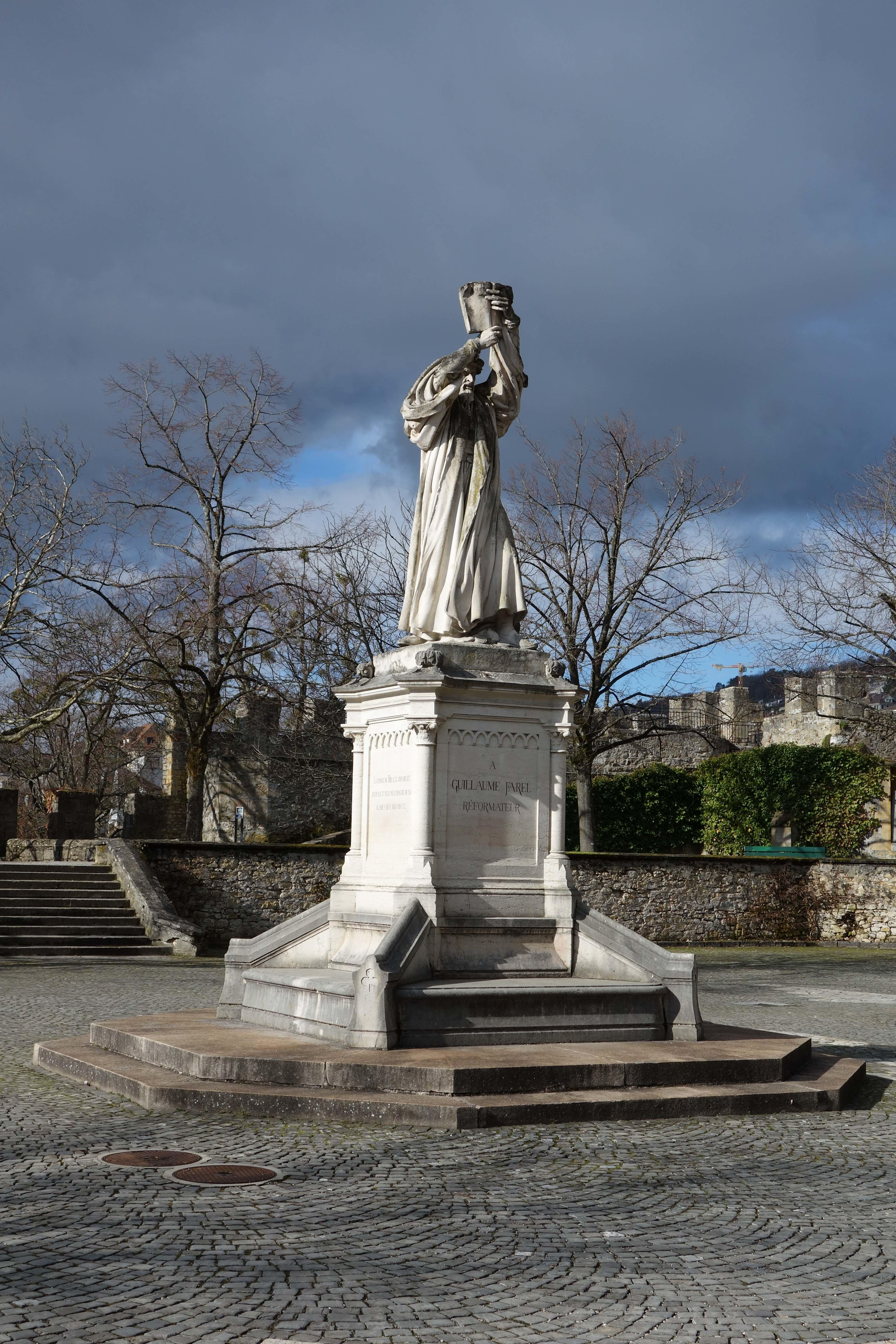 Sur l'esplanade de la Collégiale de Neuchâtel.